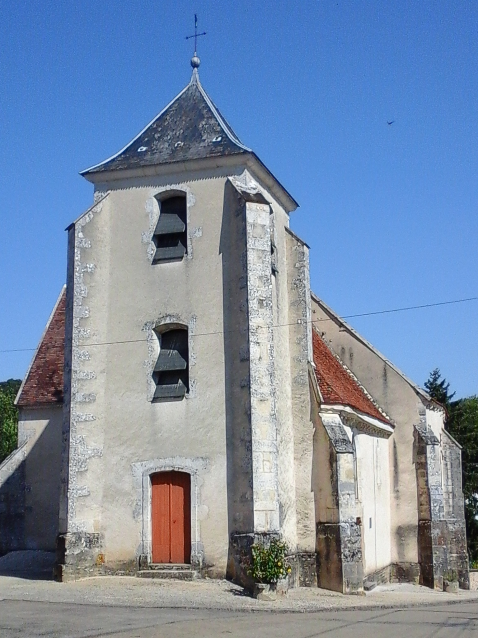 CHURCHE